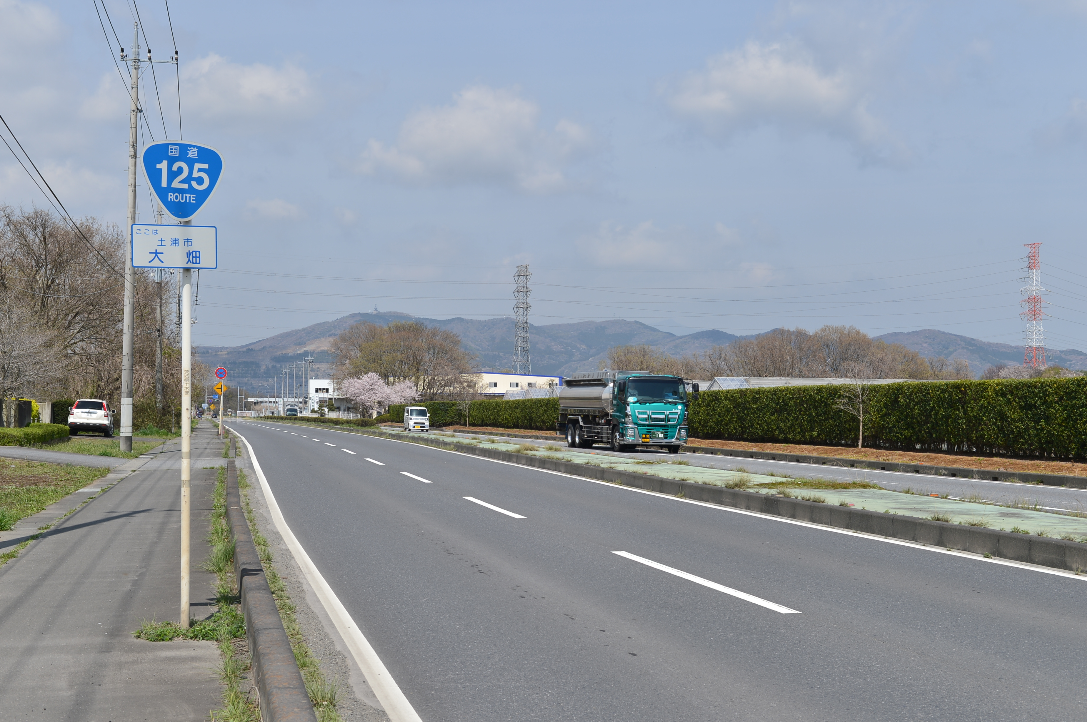 国道125号土浦新治バイパス（土浦市大畑）。つくば市方面に向けて撮影。